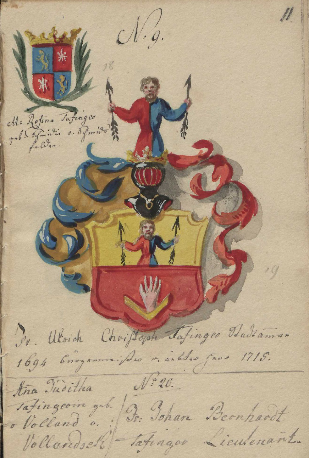 Wappenbuch der adeligen Gesellschaft zu Ravensburg. UB Augsburg – Oettingen-Wallersteinsche Bibliothek Cod.I.7.8.2, fol. 11r Ulrich Christoph Tafinger (evangelischer Bürgermeister 1715–1736) Rosina Tafinger, geb. Schmidin v. Schmidsfelden